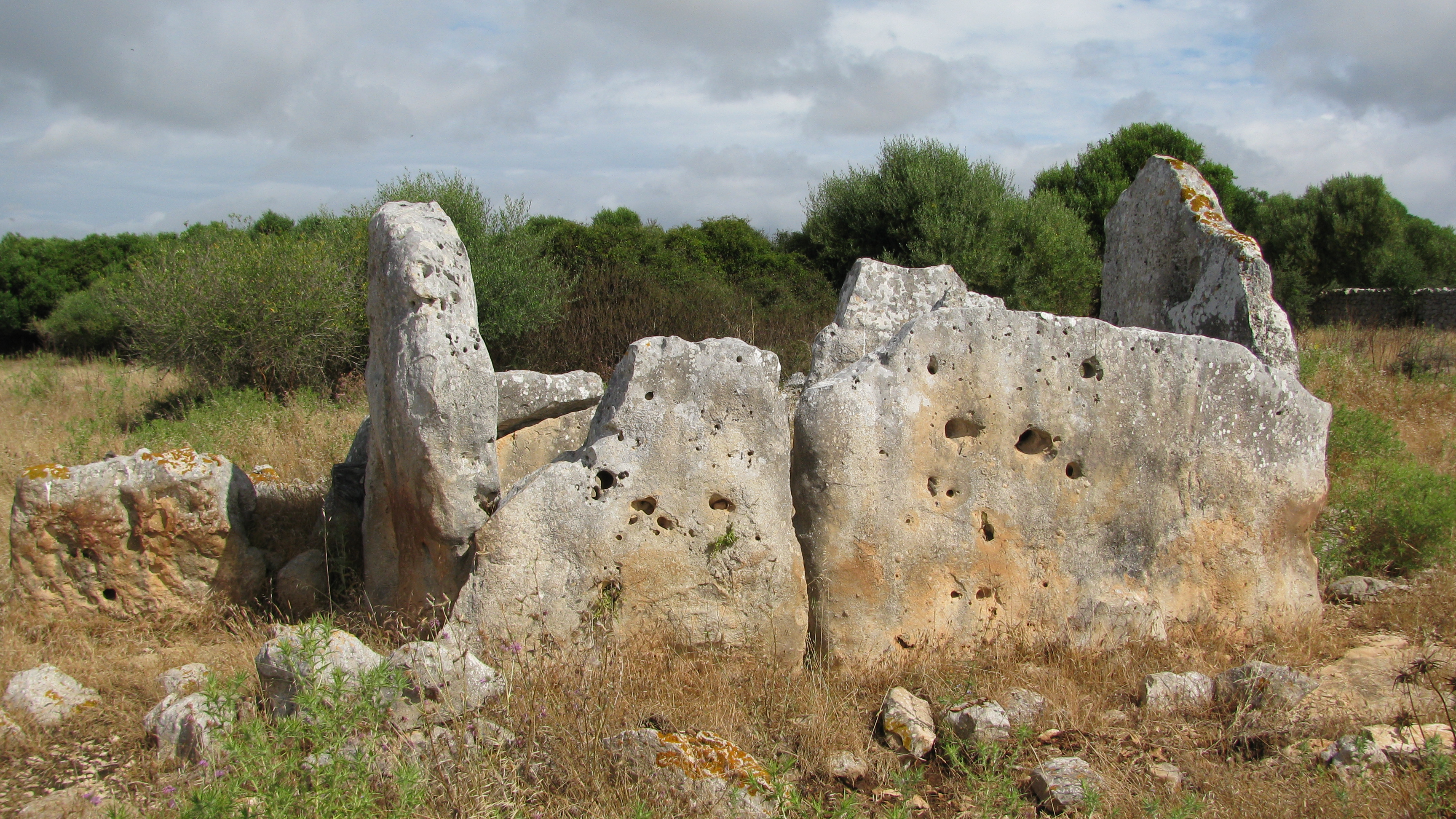 Sepulcre megalític de Roques Llises (Alaior)